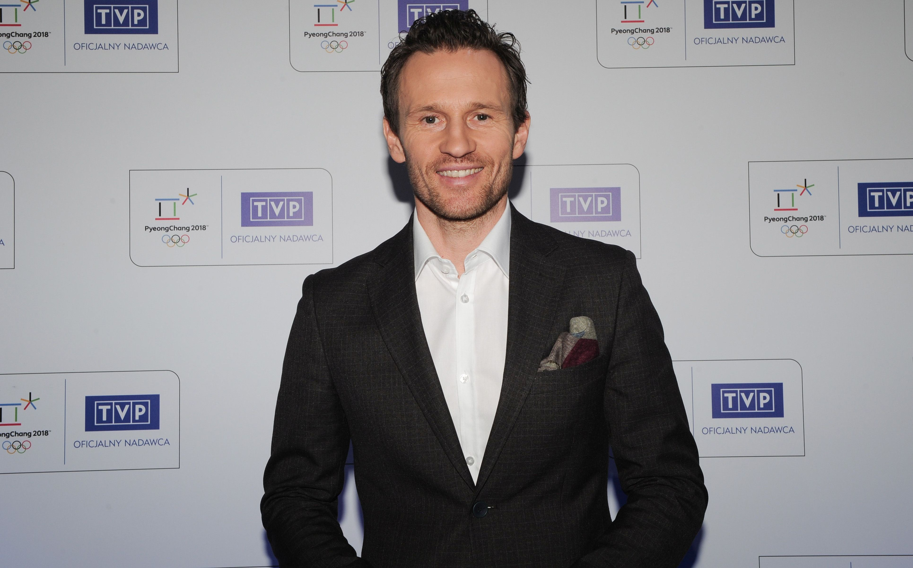 Mariusz Czerkawski